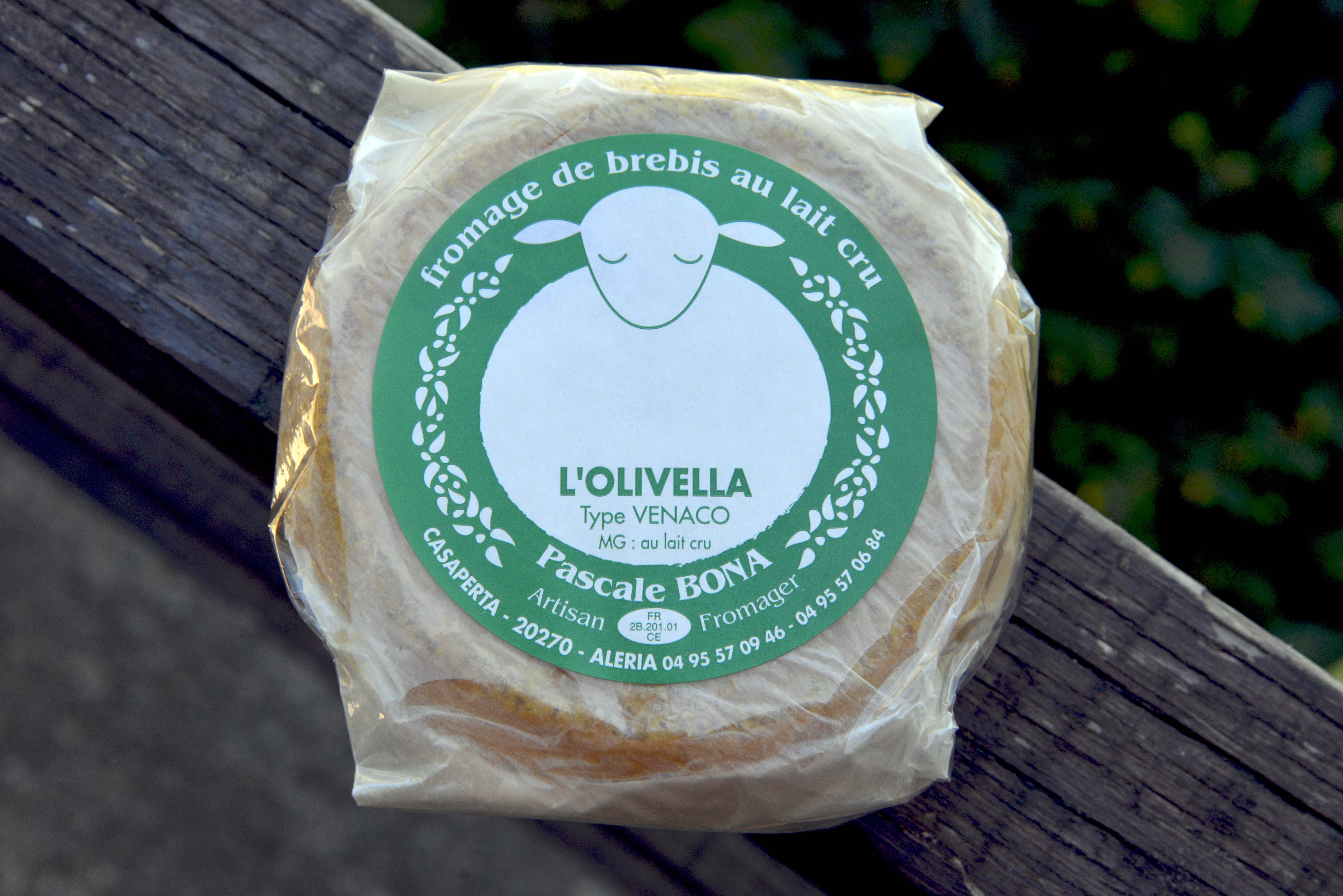 Aléria, Plaine orientale (Haute-Corse) - Fromage de brebis au lait cru "L'Olivella" de Pascale Bona, artisan fromager à Casaperta.